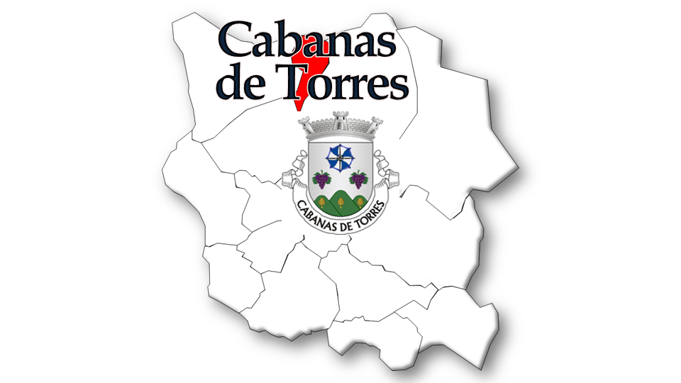 Evolução da População